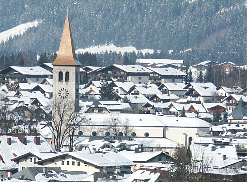 Saalfelden Kirche Winter